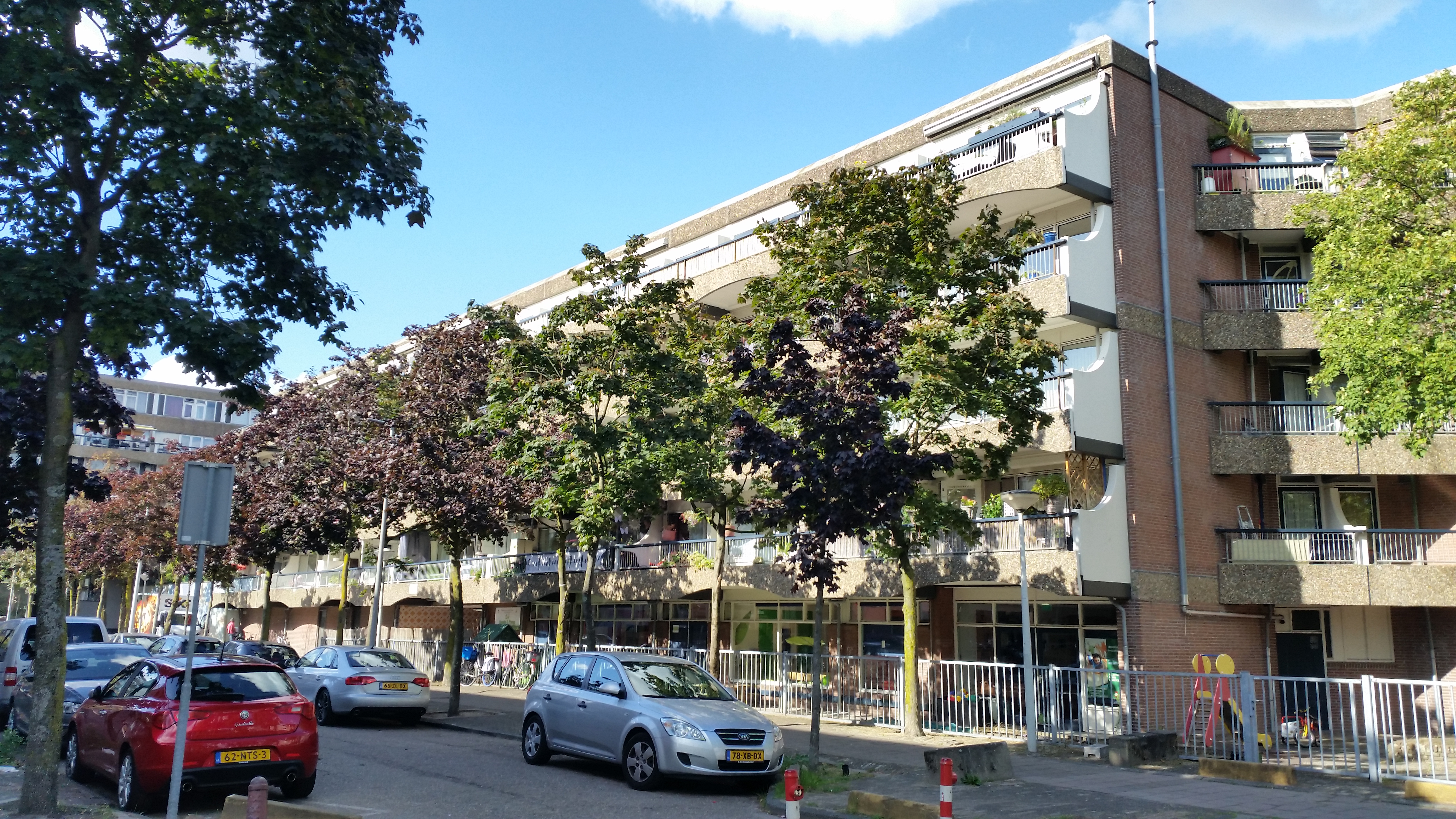 De woningen aan Olifantswerf staan met de achtergevel aan de Kattenburgerkruisstraat, Amsterdam